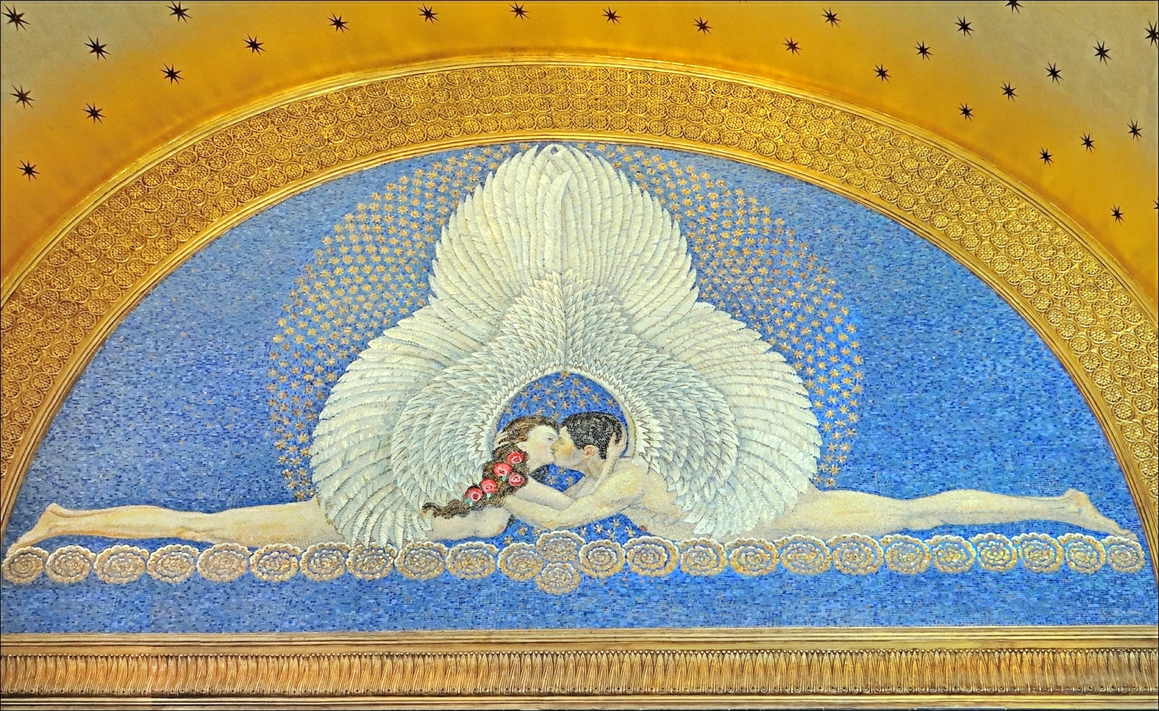 Mosaïque "The Kiss" dans le hall d'entrée de la Tour du mariage (Wedding tower, Hochzeitsturm) mosaïque de Friedrich Wilhelm Kleukens 1914 La tour du mariage a été conçue par l'architecte Joseph Maria Olbrich (1867-1908) pour servir de signal à la colonie d'artistes jugendstil et honorer son fondateur le Grand-Duc de Hesse. Elle est surmontée d'une couronne à cinq doigts La tour a été érigée en 1908 sur la Mathildenhöhe (la colline de Mathilde) à l'initiative de la ville de Darmstadt en l'honneur du second mariage du Grand-Duc Ernst Ludwig de Hesse (Louis V de Hesse) qui avait eu lieu en 1905 avec Eléonore de Solms-Hohensolm-Lich. Très dégradée après la dernière guerre comme tous les bâtiments de la colline dont certains avaient été détruits par les bombardements alliés, l'extérieur et l'intérieur de la tour ont été totalement restaurés de 1982 à 1990 dans le cadre de la rénovation de la Mathildenhöhe. Dans ce lieu emblématique et culturel de Darmstadt, la ville offre la possibilité d'organiser des fêtes et propose une grande salle décorée appelée la chambre du mariage pour la cérémonie civile.